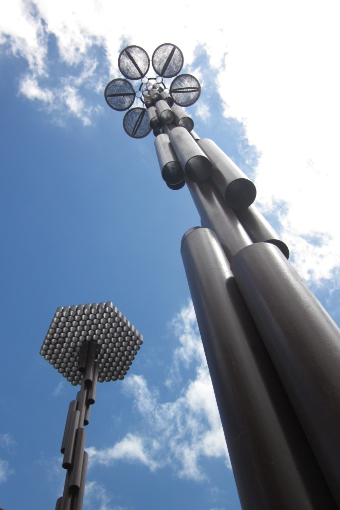 Expresión volumétrica de la flor de la vida por Ibo Bonilla